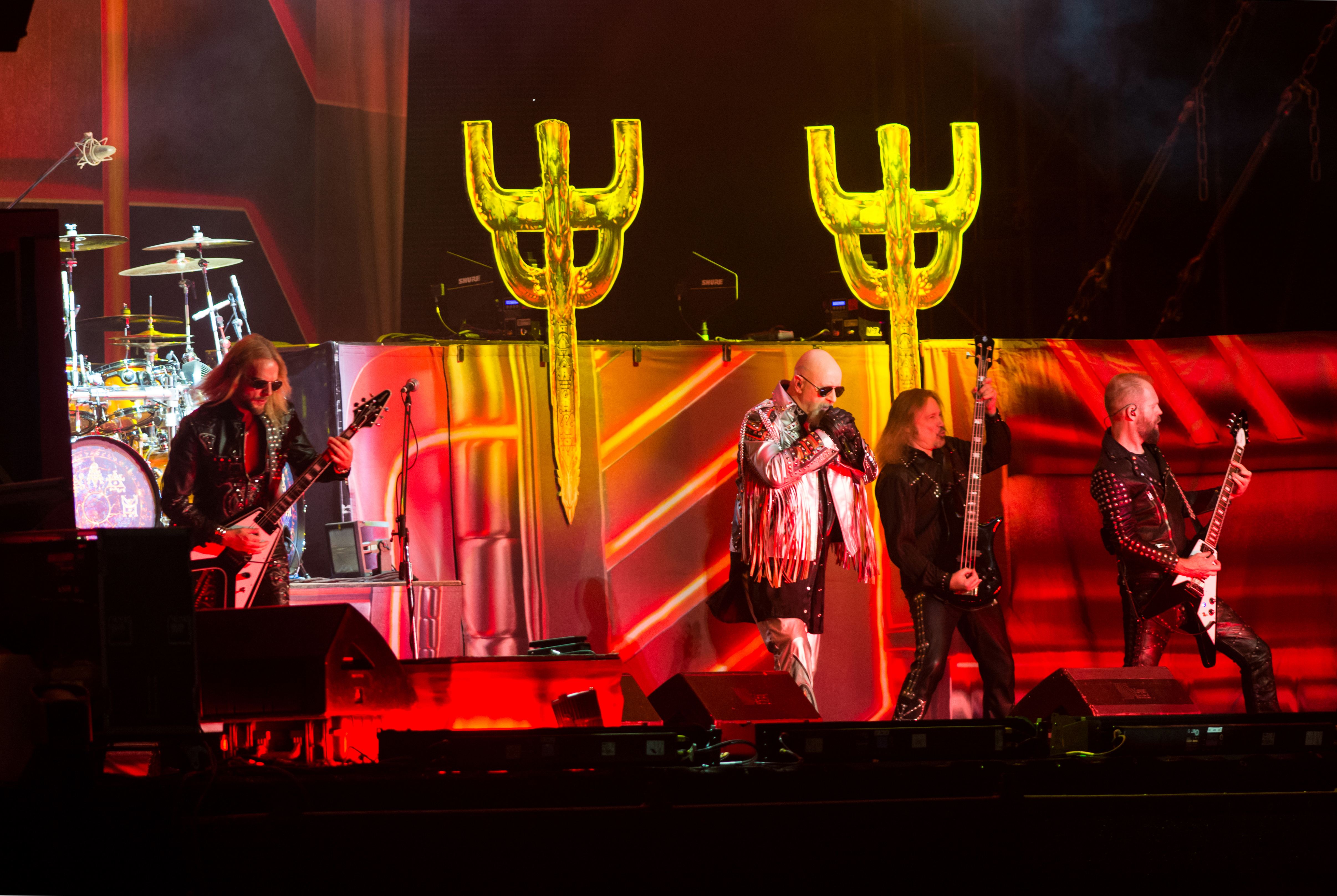 Judas Priest beim Wacken Open Air 2018